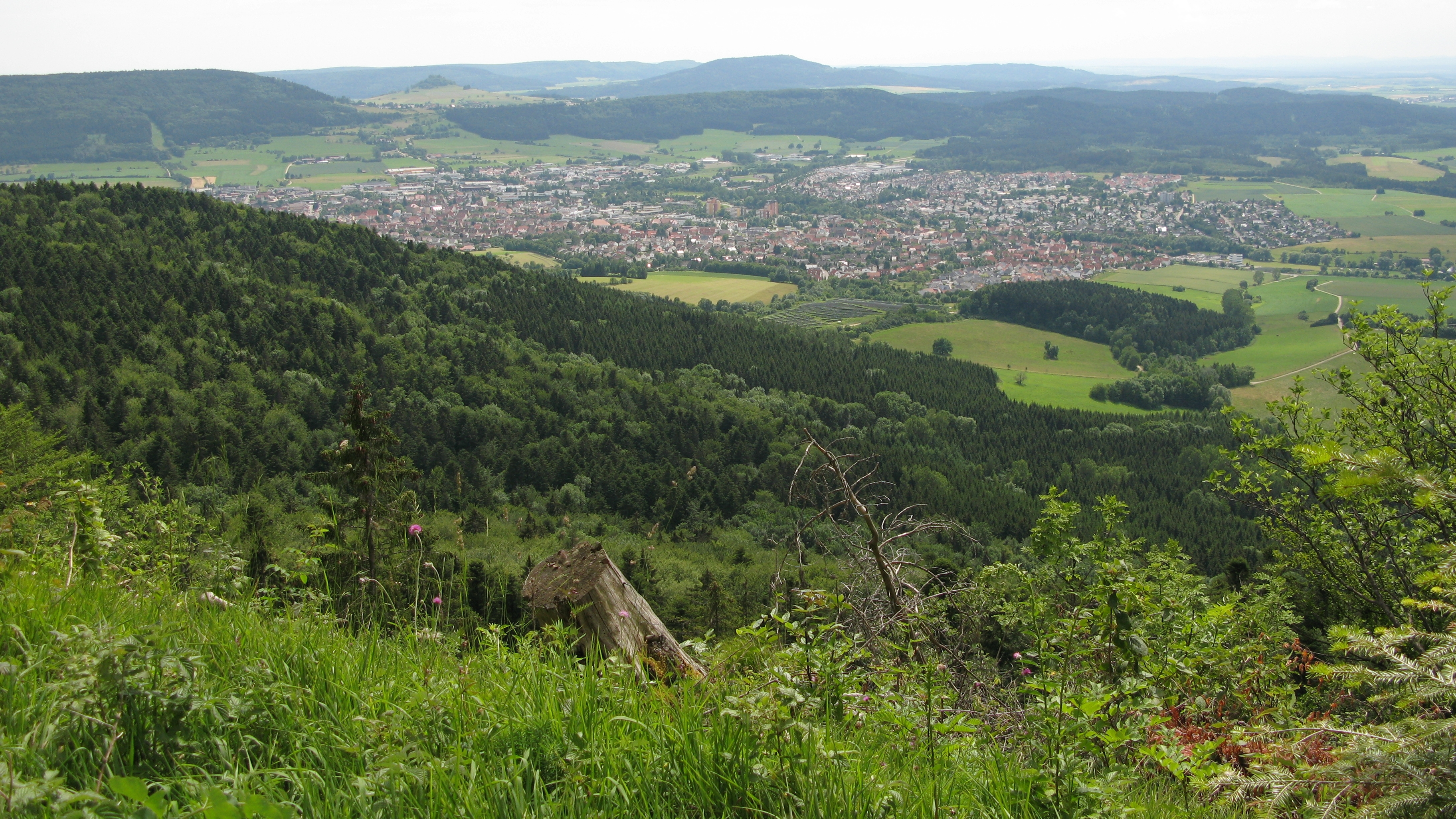 Blick auf Spaichingen vom Donauberglandweg in der Nähe des Klippenecks auf der Schwäbischen Alb.